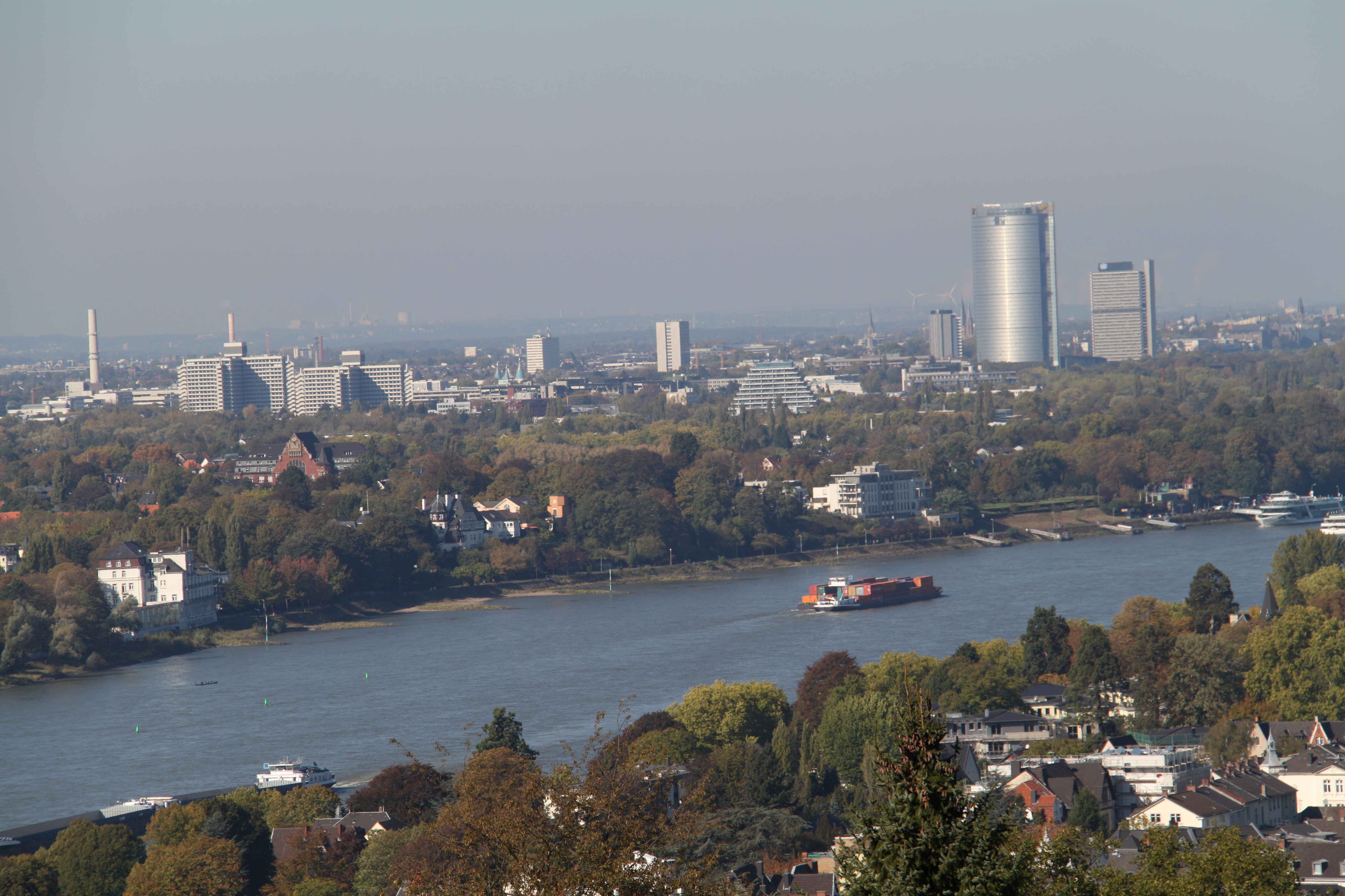 Blick vom Drachenfels, in der Mitte Bauten des Bundesviertels